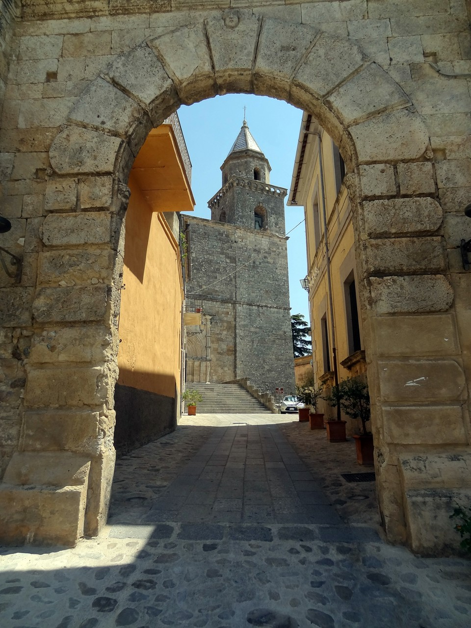 Cropani (KR) - Calabria